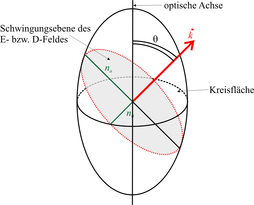 Brechungsindex-Ellipsoid → Doppelbrechung